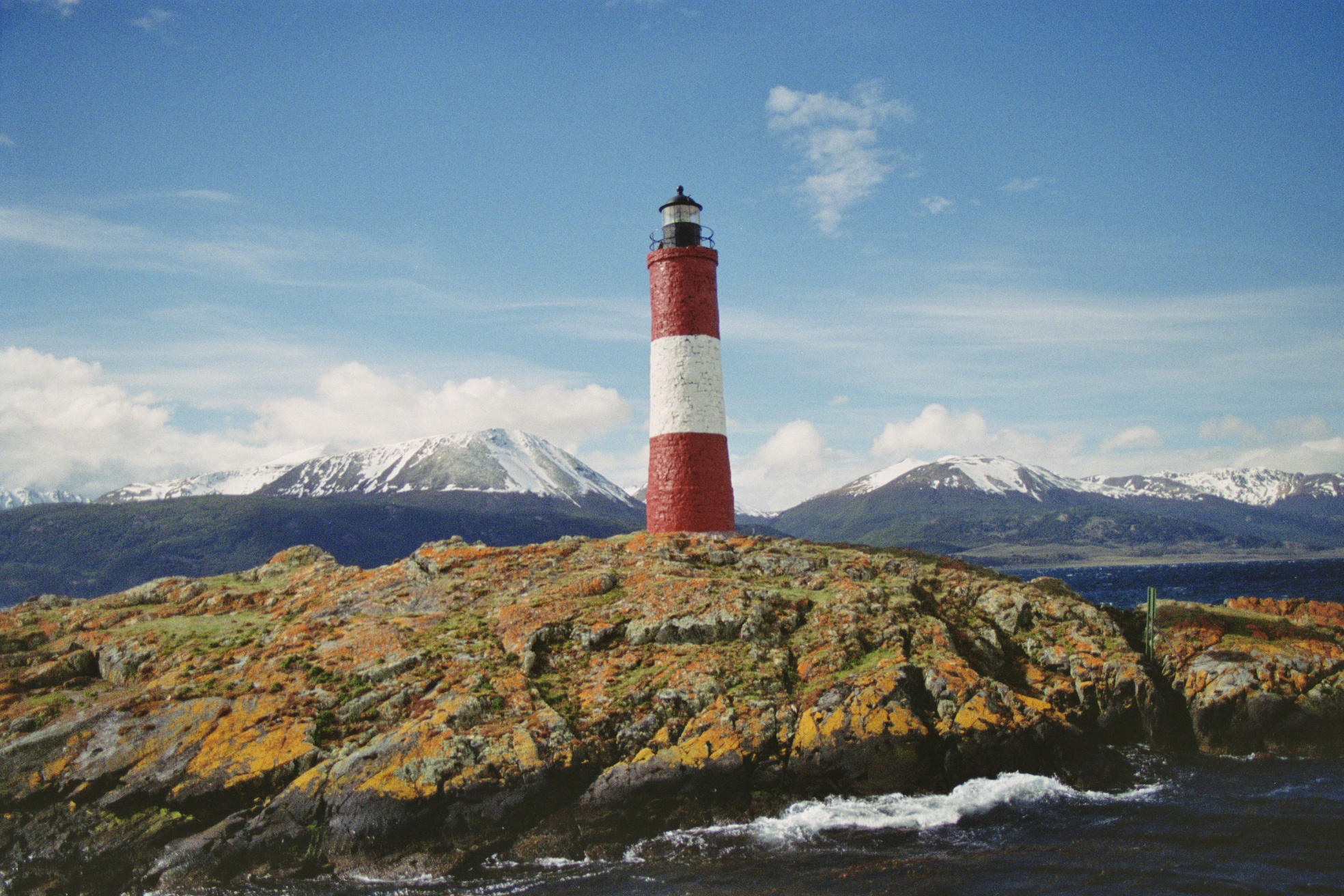 Le Phare des Eclaireurs